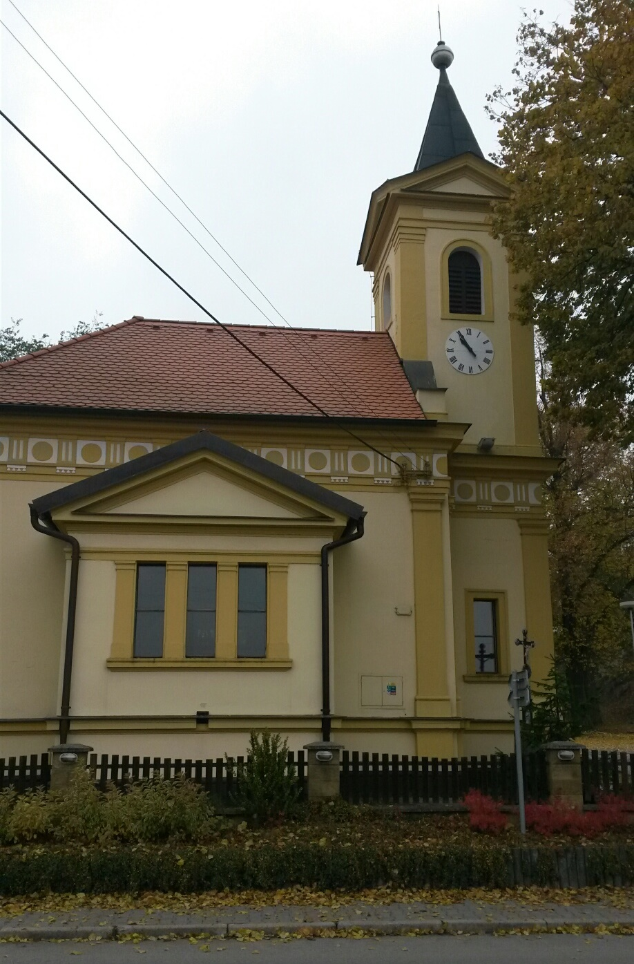 kaple v Maršově (2016)